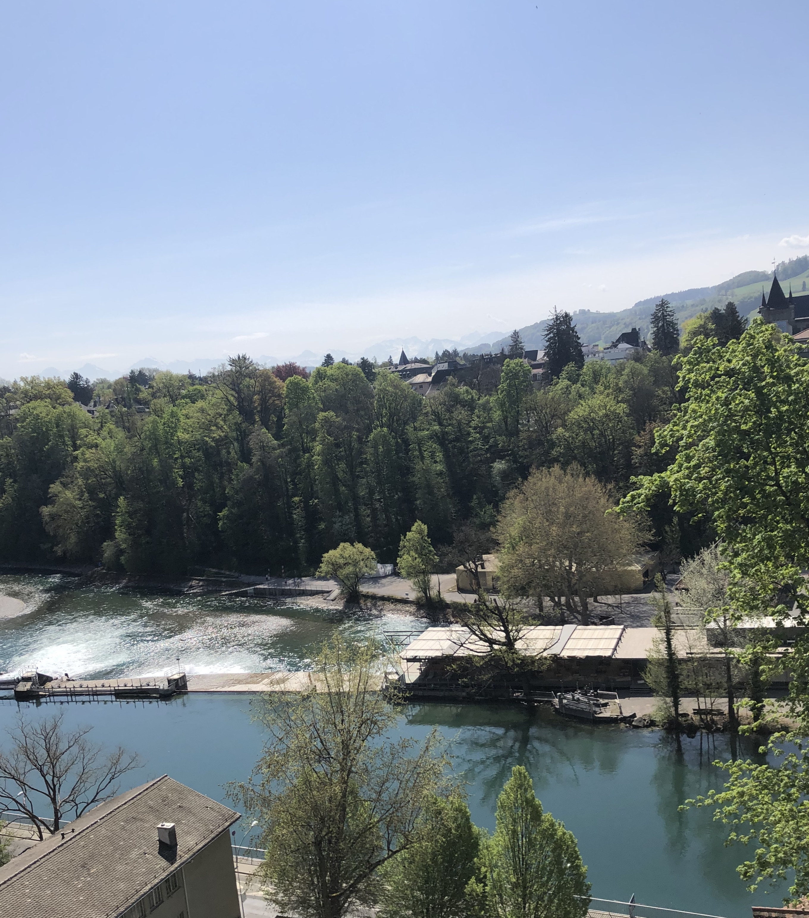 Schwellenmätteli von Casinoterrasse